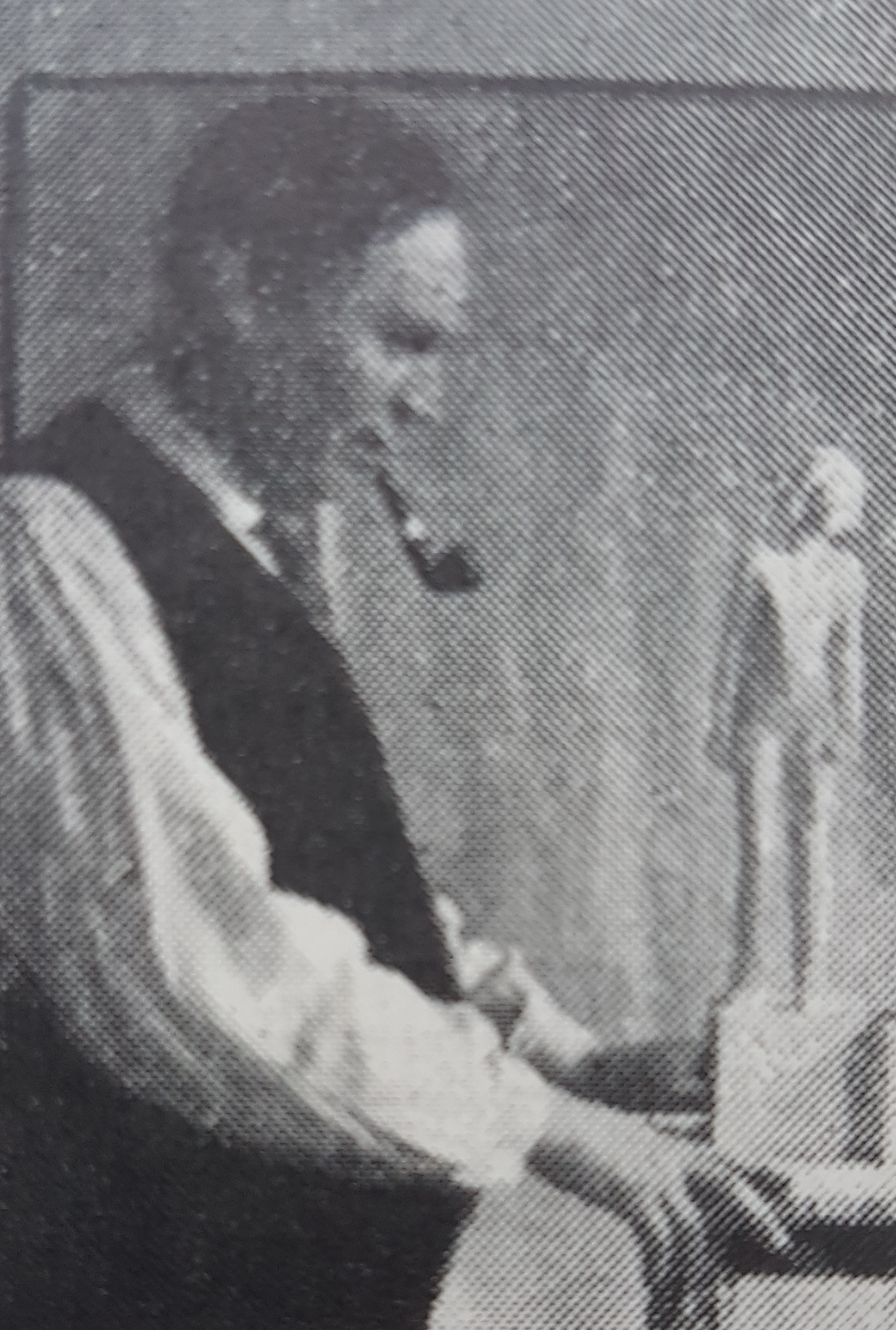 Carl Elmberg, avfotograferad porträttbild från Allhems Svenskt konstnärslexikon.